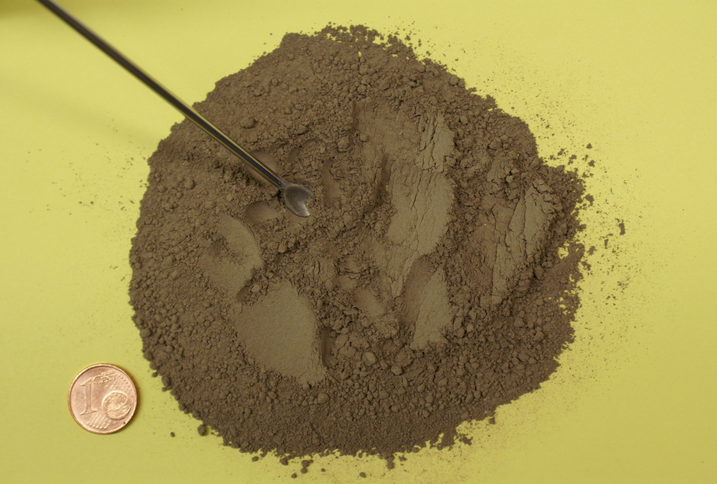 Urgesteinsmehl ist ein Bodenhilfsstoff vulkanischen Urspungs.